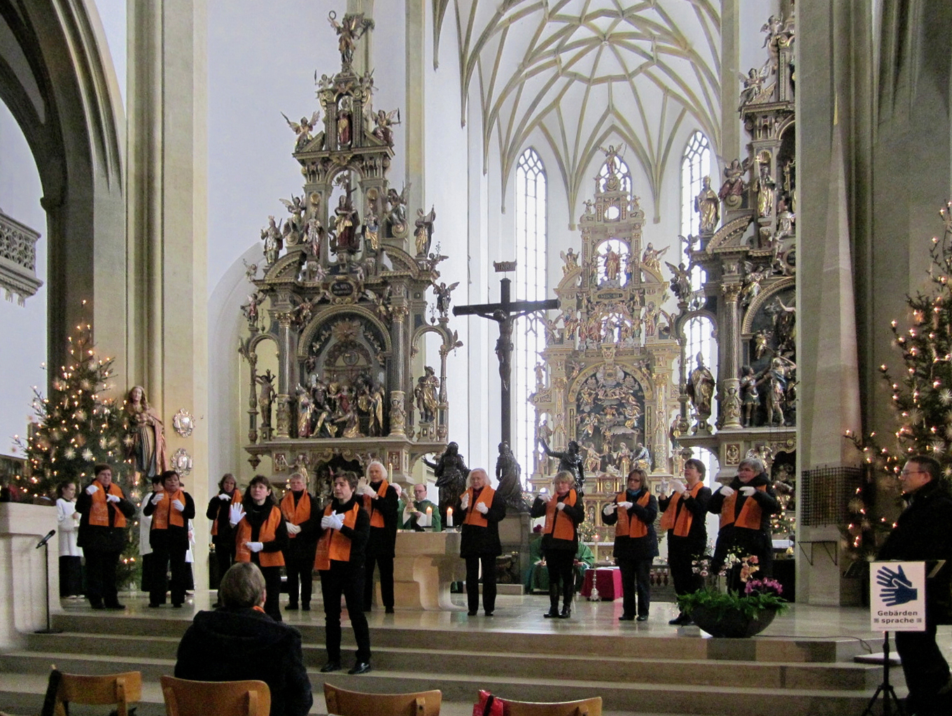 Auftritt des Ökumenischen Gebärdenchors Augsburg am 25. Januar 2015 in der Basilika St. Ulrich und Afra in Augsburg, beim Festgottesdienst und Festakt anlässlich des 25-jährigen Bestehens der Behindertenseelsorge des Bistums Augsburg.